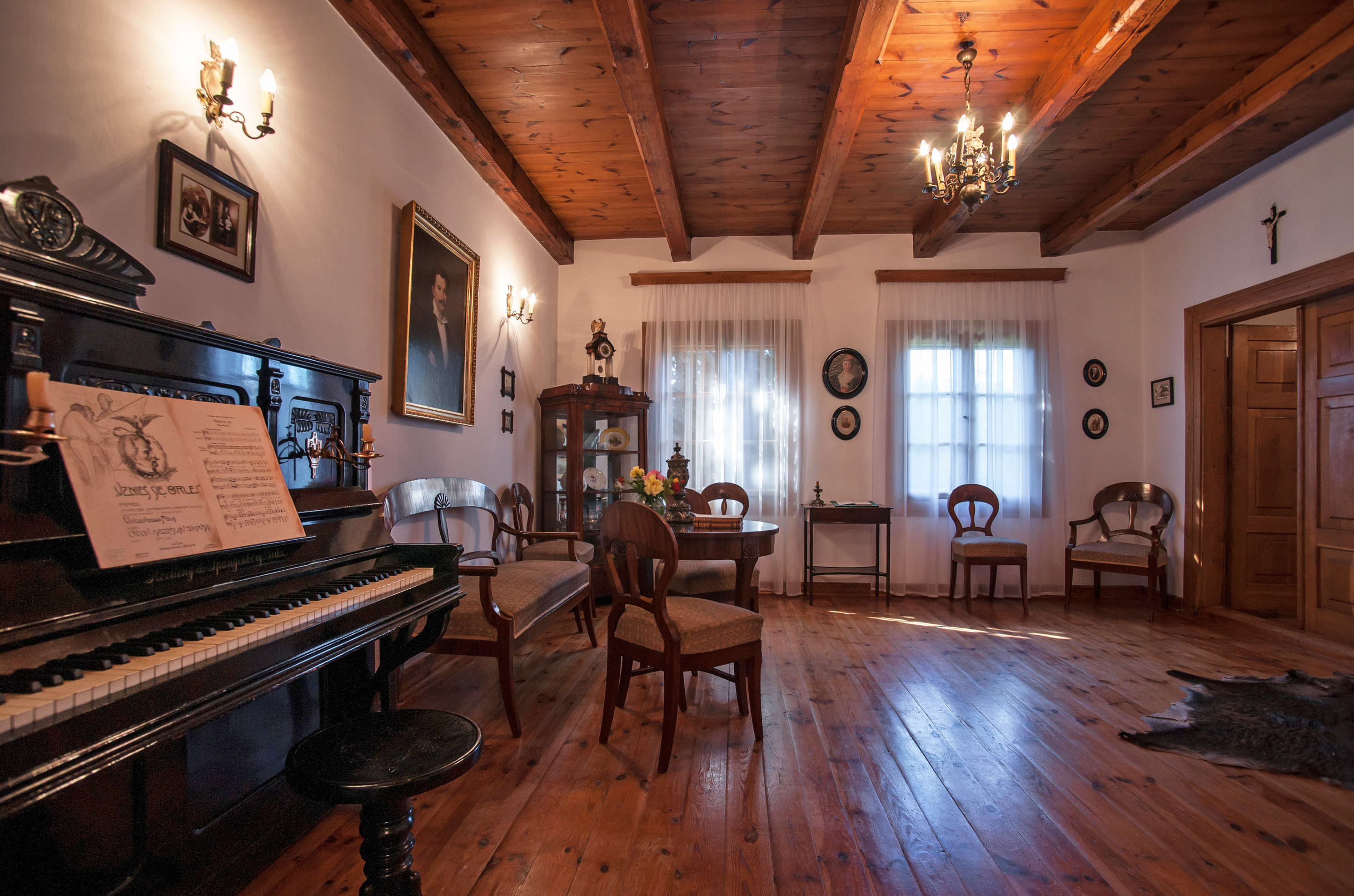 Lublin, dwór Wincentego Pola, XVIII/XIX